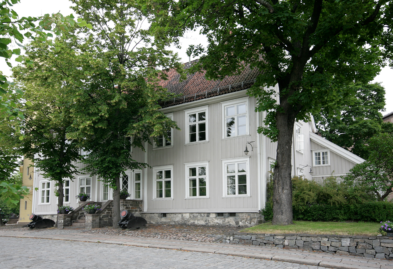 Kommandantskapet, Akershus festning, Oslo. Bygd 1800. Arkitekt: Patrocolus von Hirsch.